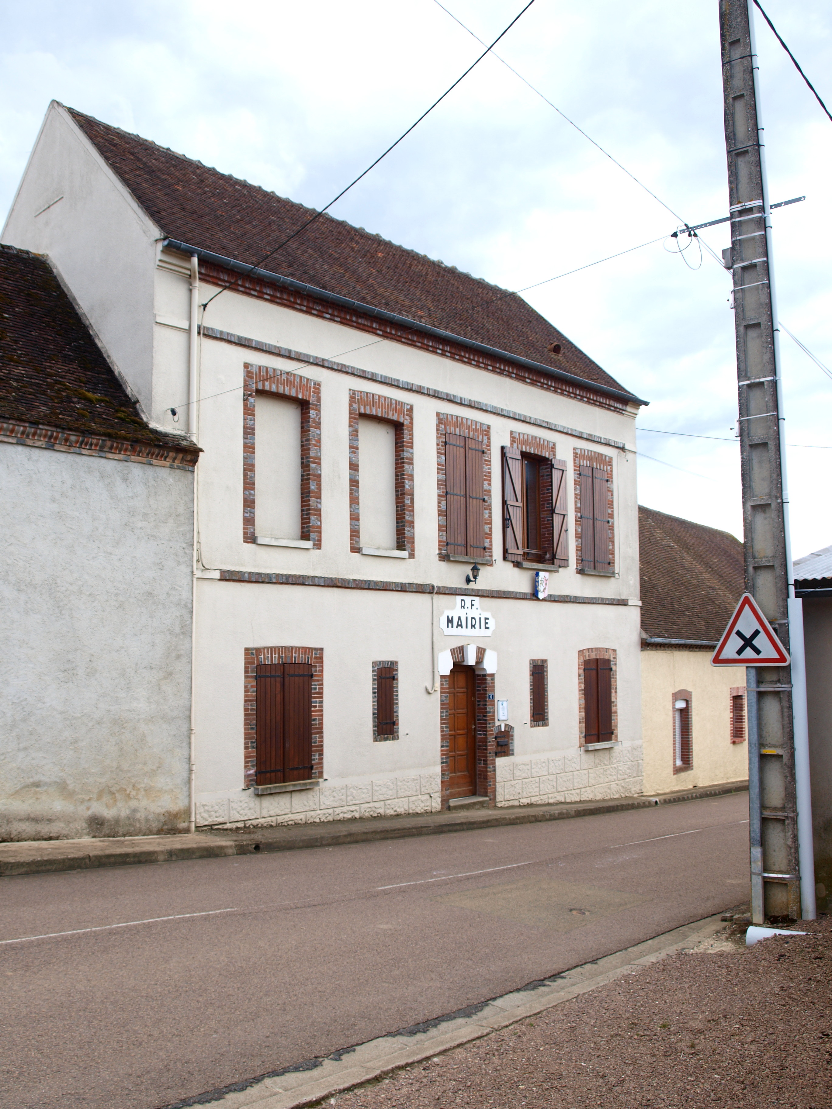 Pailly (Yonne, France) ; mairie